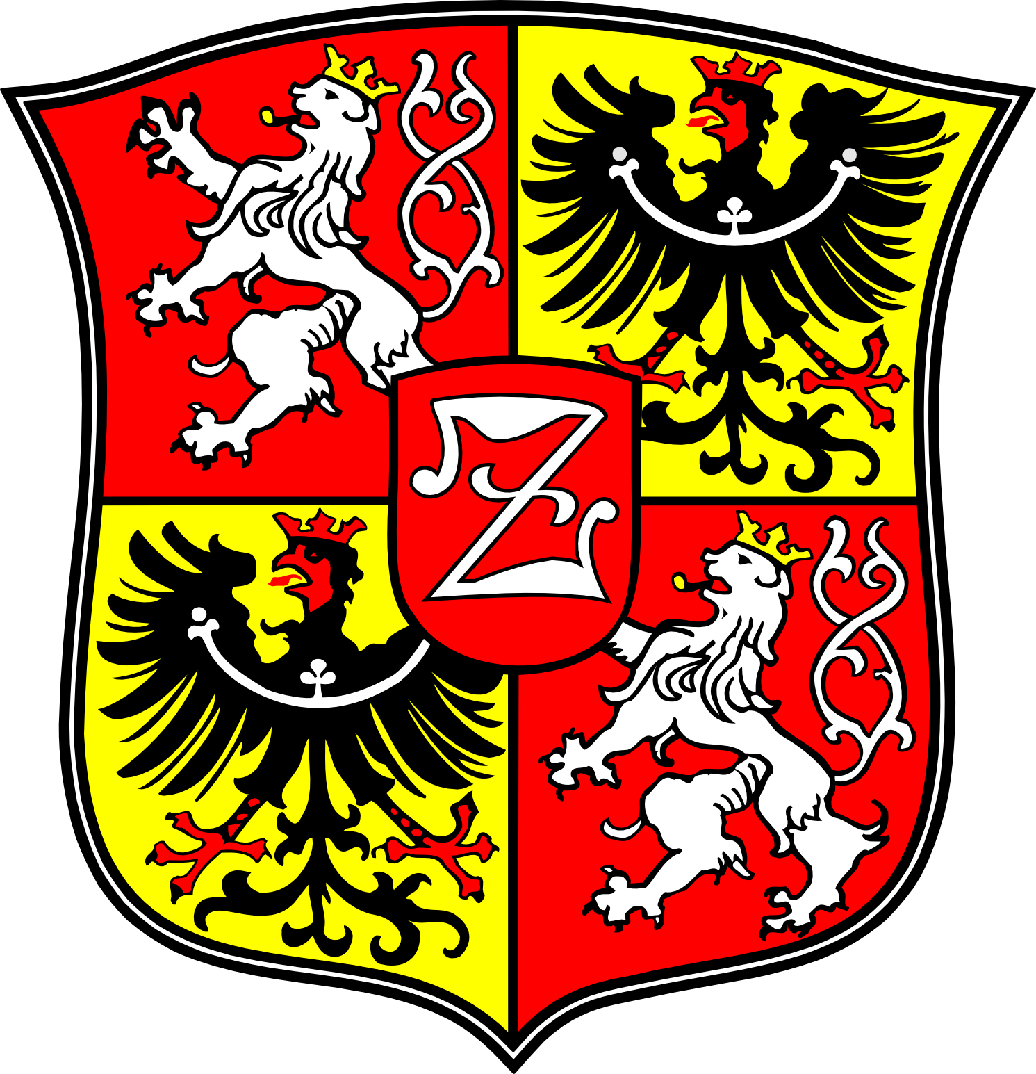 Stadtwappen von Zittau